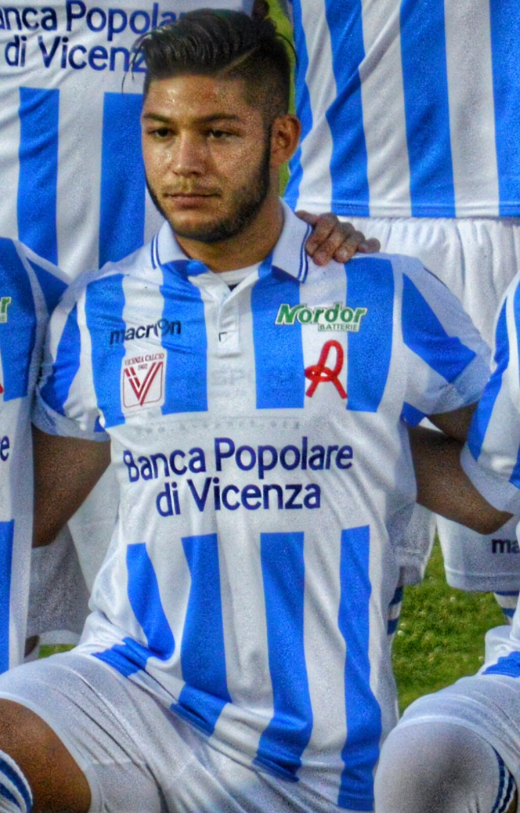 Formazione iniziale del Vicenza nel 1° Trofeo Morosini